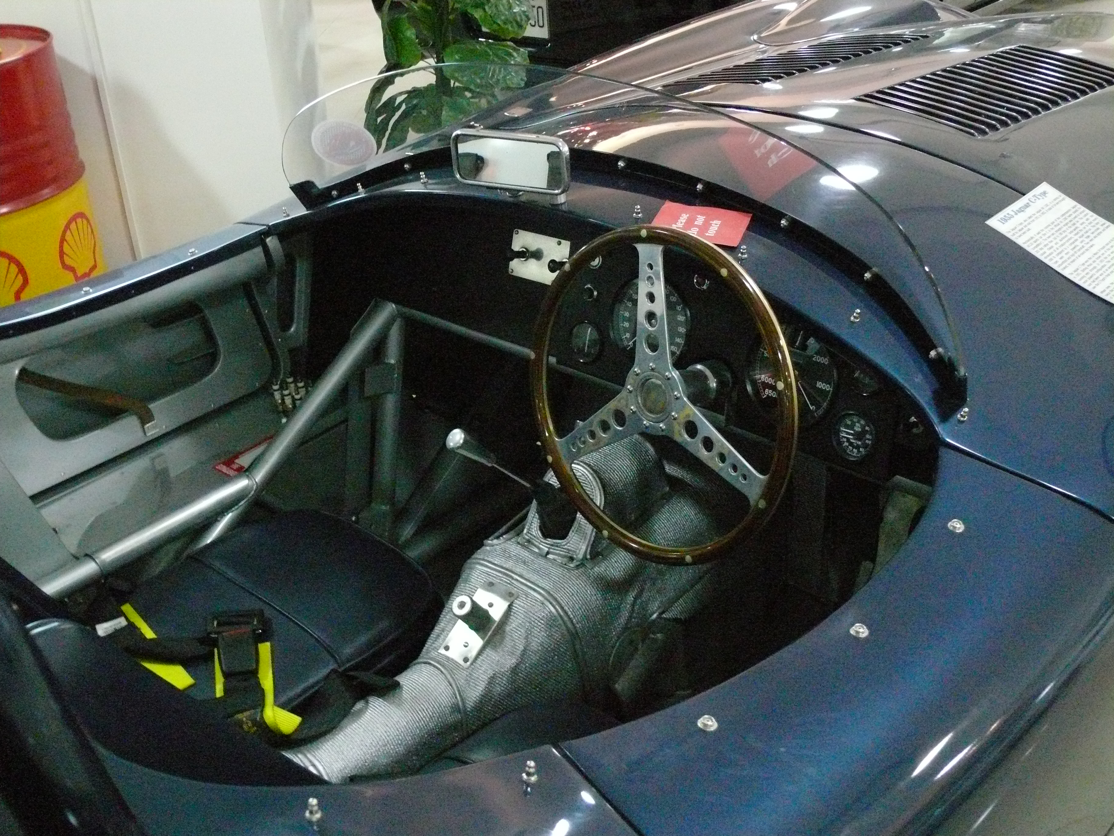 Jaguar XK120C ,,C-type" 1955, Malta Classic Car Museum